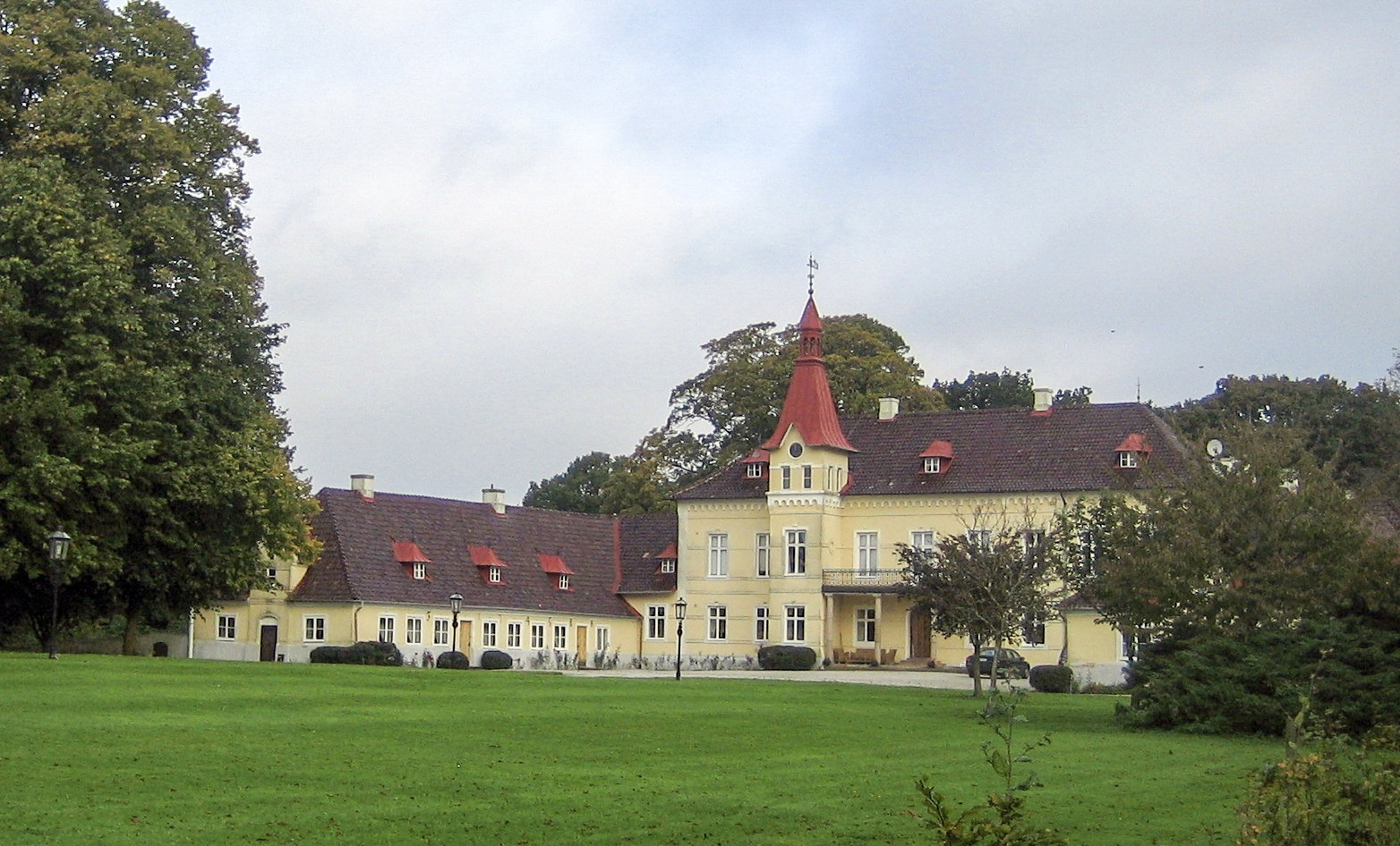 Klågerup castle, Skåne, Sweden